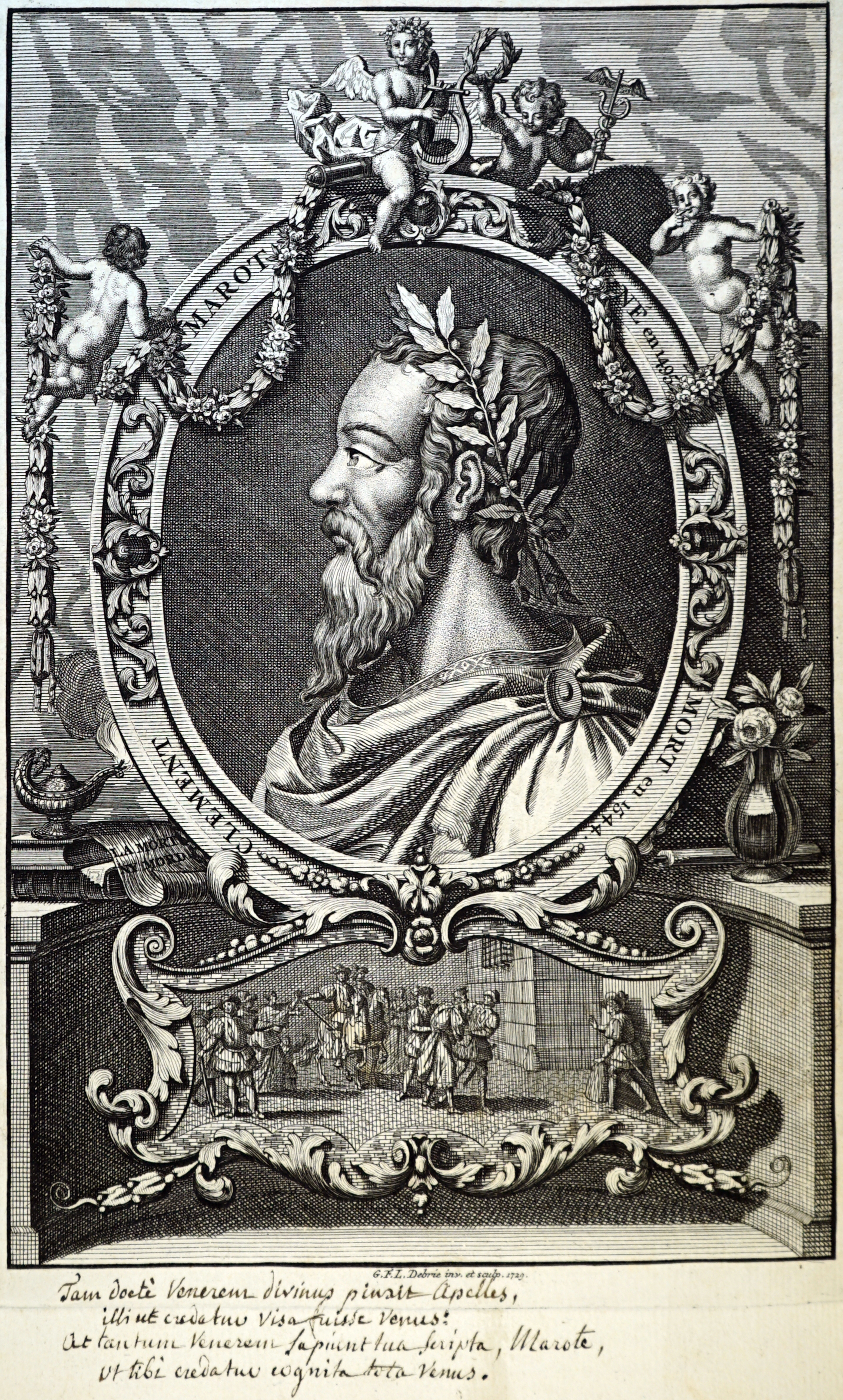 Oeuvres de Clément Marot.